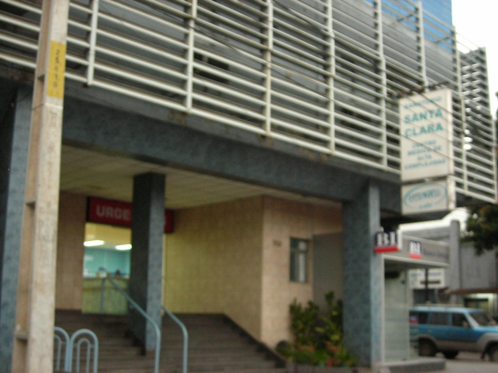 clasa